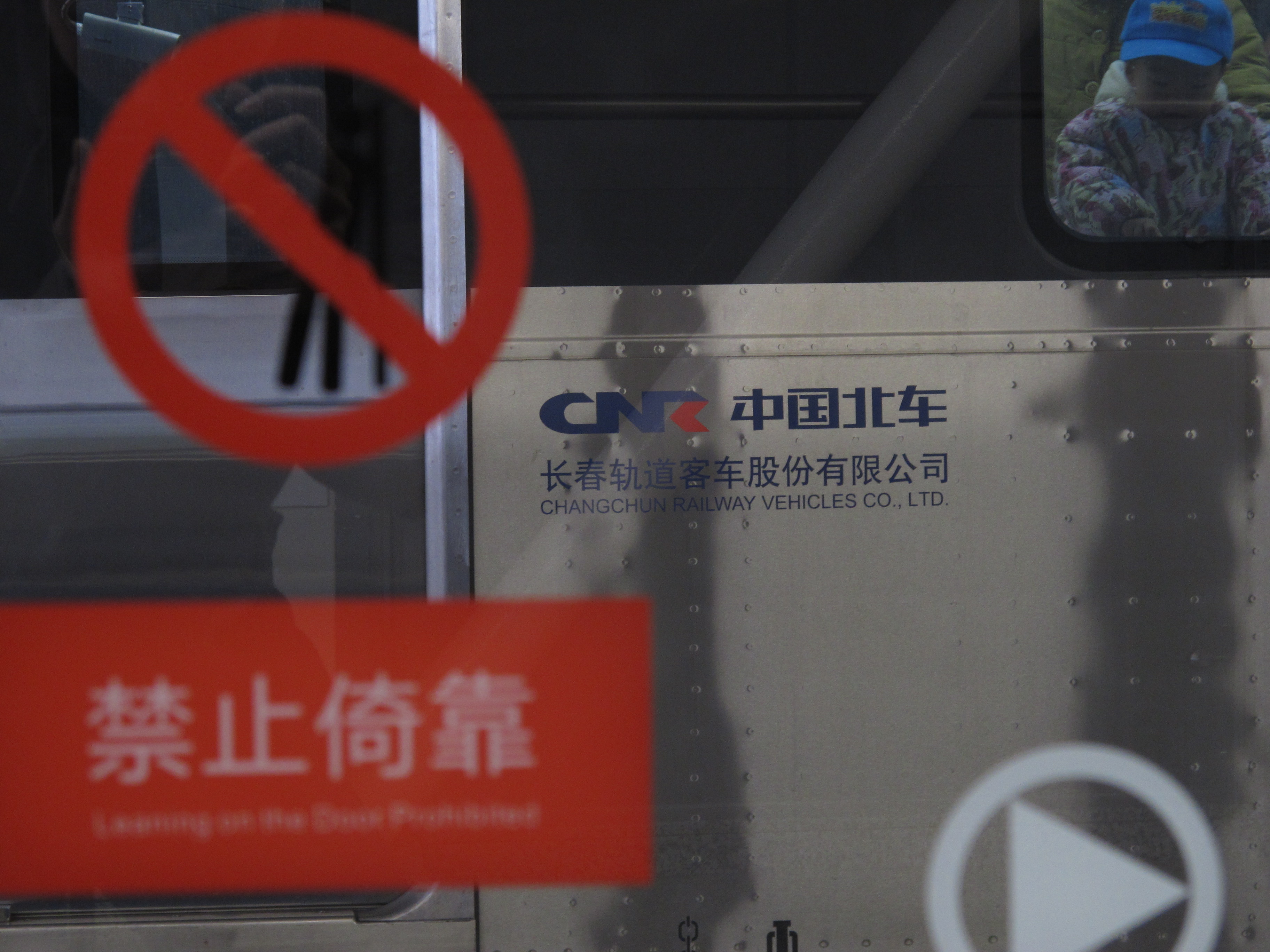 重庆轨道交通1号线列车全部由中国北车制造